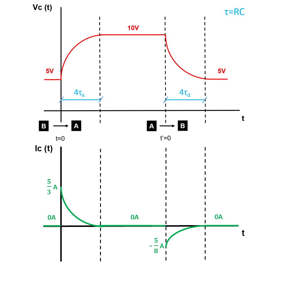 Irudi honek kondentsadore baten portaera adierazten du.